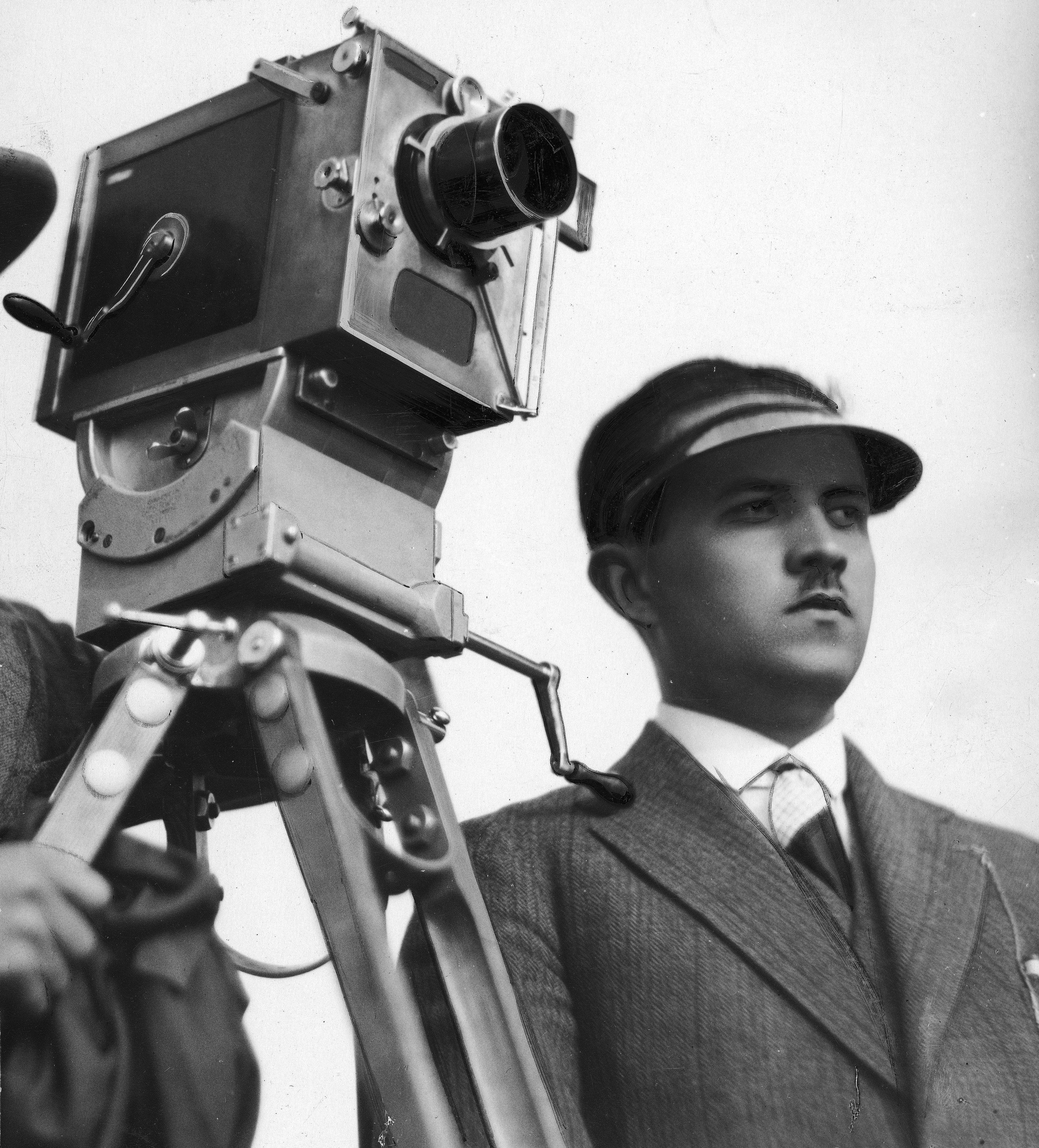 Henryk Szaro, reżyser teatralny i filmowy. Fotografia sytuacyjna (podczas pracy). Z boku widoczna kamera filmowa.